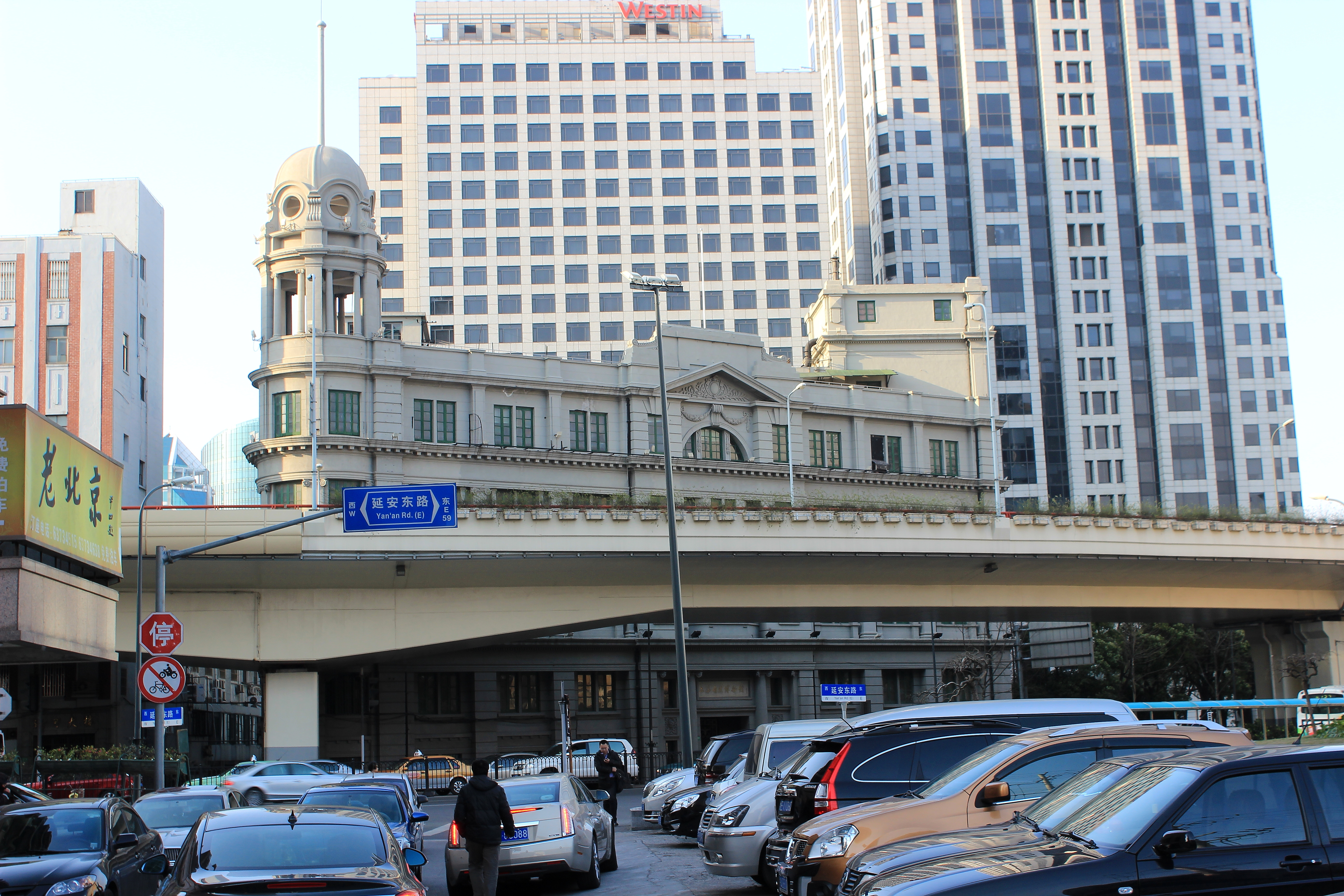 中文（中国大陆）: 上海华商纱布交易所大楼